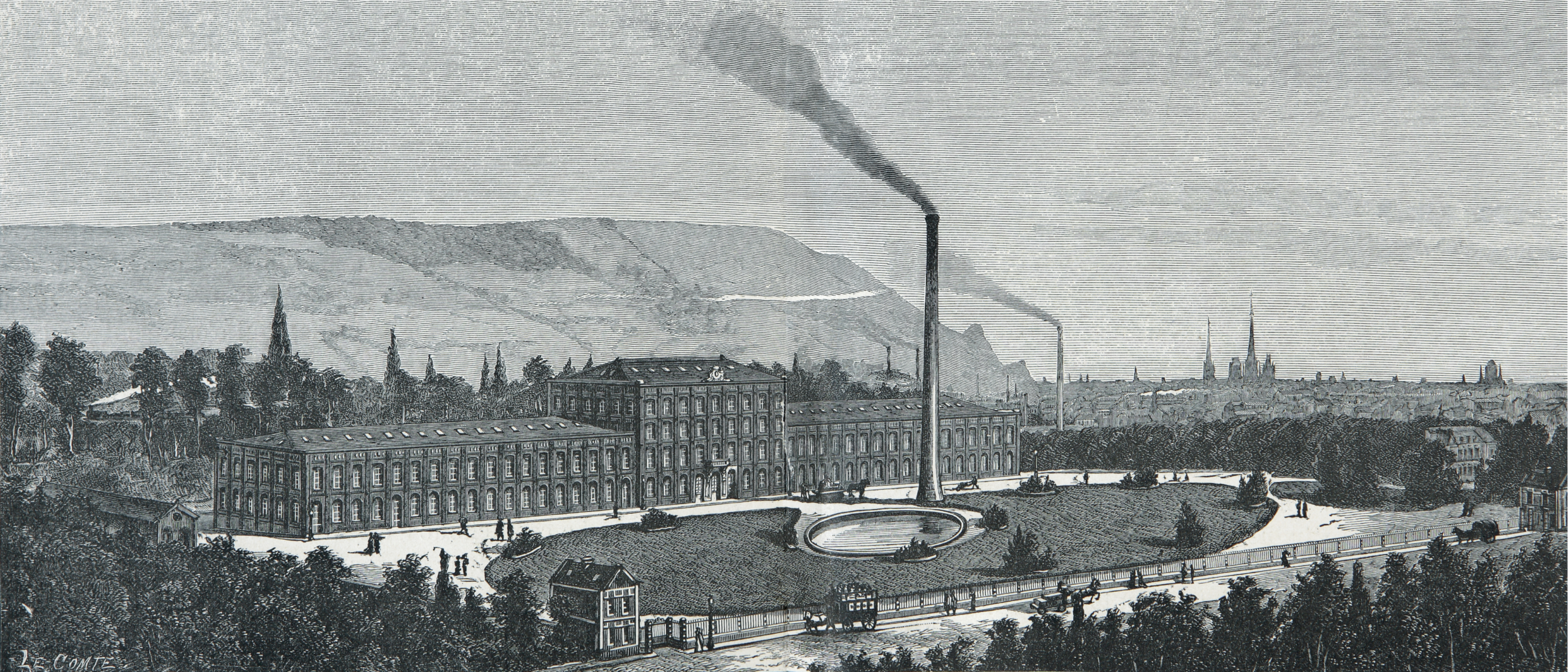 Usines de tissage Fromage (Rouen-Darnétal)